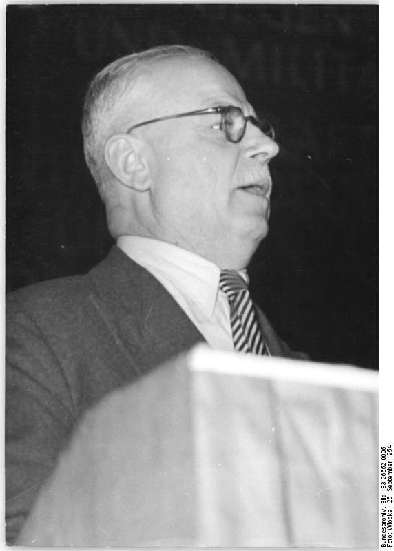 Zentralbild-TBD-Wlocka Zi-Ku. 1235. A.-V. 27.9.1954 25.9.1954 -2468- 7. Parteitag der CDU in Weimar - 21. bis 25.9.1954 Der 3. Verhandlungstag, Freitag, der 24.9.1954 stand im Zeichen der Aussprachen. UBz: Robert Scholl, aus Ulm, der Vater der Geschwister Scholl, die von der NS-Justiz gemordet wurden, bei seiner Ansprache